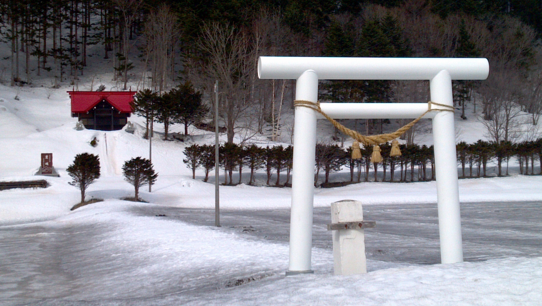 Kogawa Shrine Torii